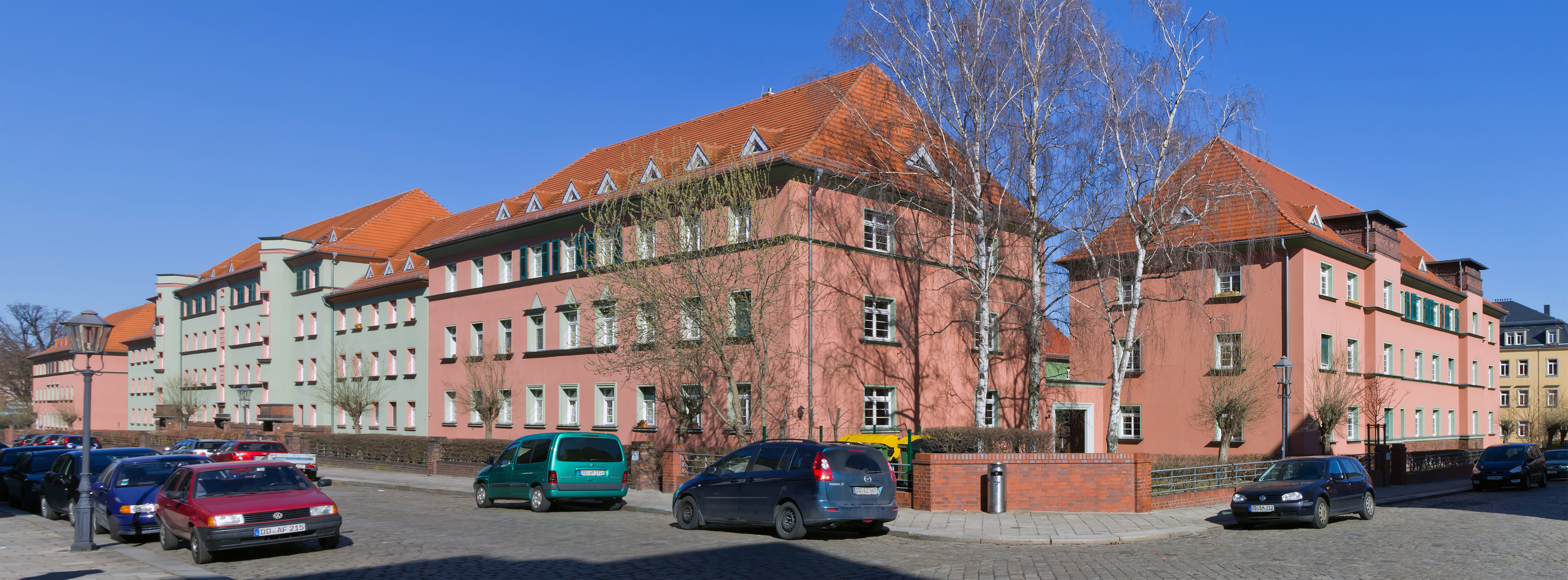 Malterstraße 41-57 Essener Straße 2-4